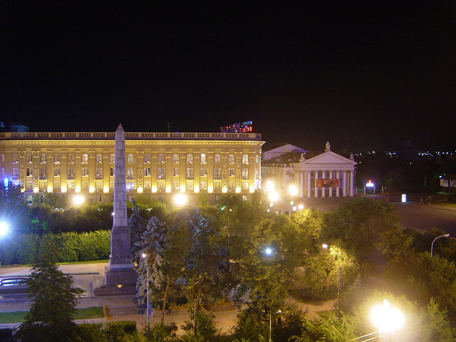 Volgograd: Alleja Gerojev met hotel Volgograd, theater en monument voor WO II